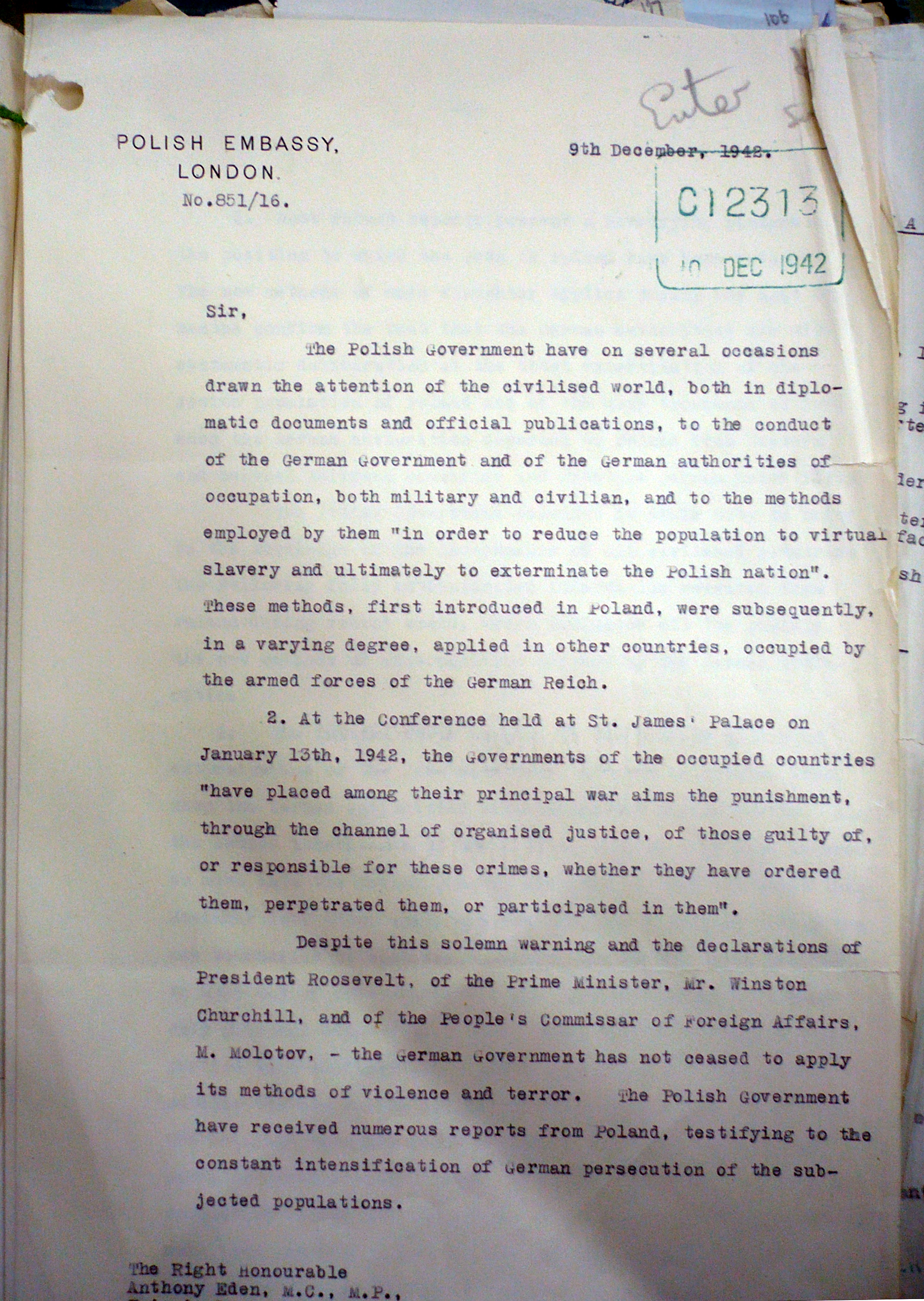 "Nota Raczyńskiego", 10 grudnia 1942, Edward Bernard Raczyński.